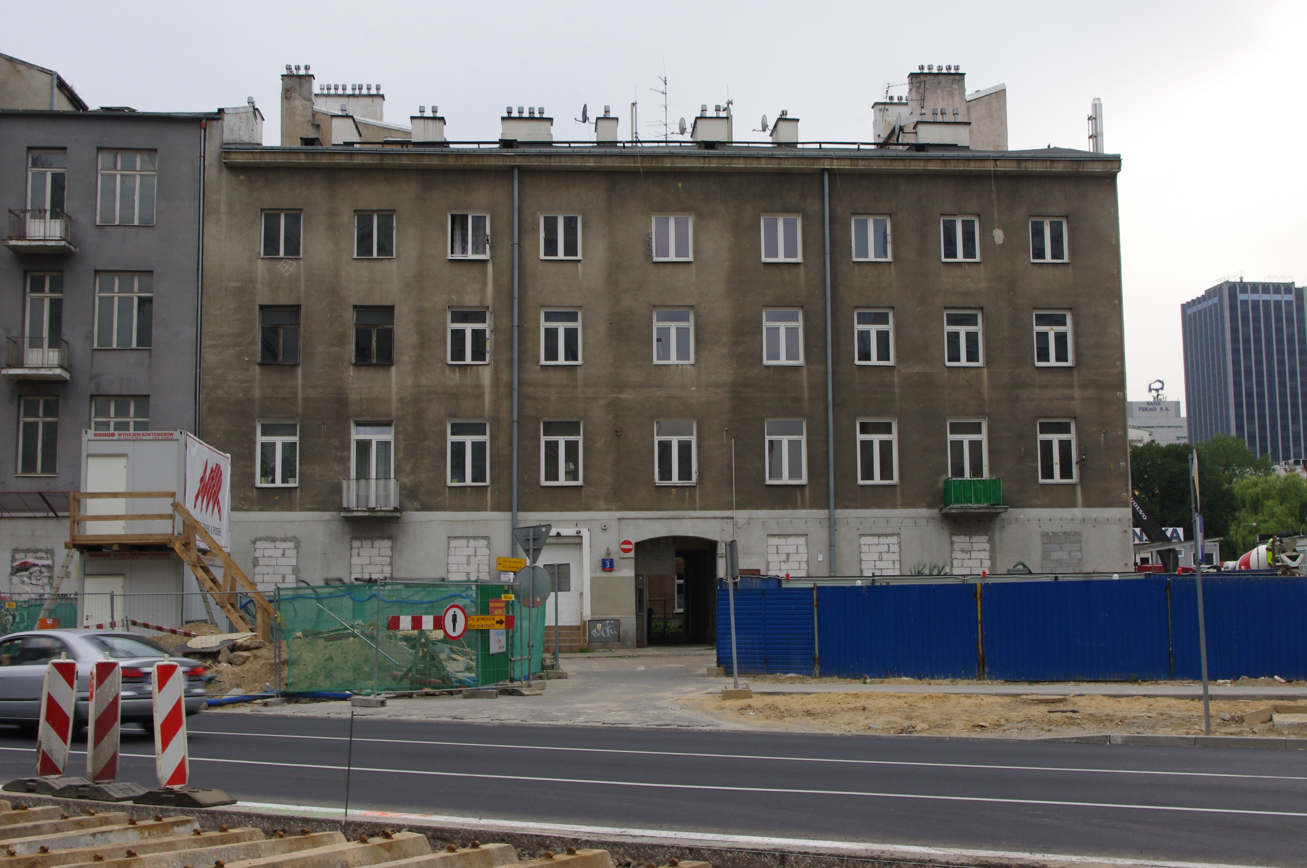 Kamienica przy ul. Ciepłej 3 na warszawskim Mirowie, w którym urodził się ks. Ignacy Skorupka (stan na lipiec 2012 – budowa metra)